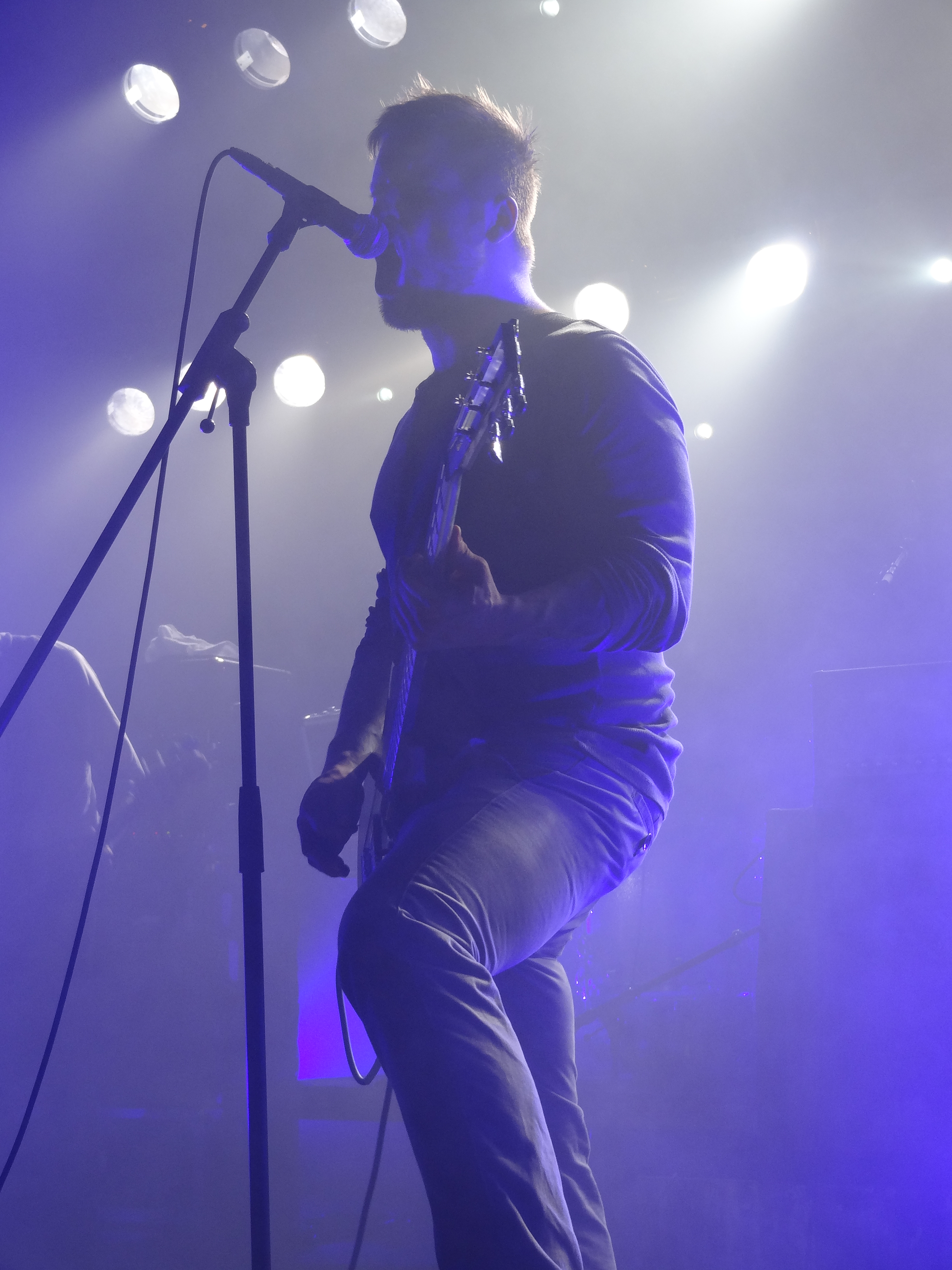 Chanteur de Cult of Luna lors de leur concert à la salle Razzmatazz 3, Barcelone